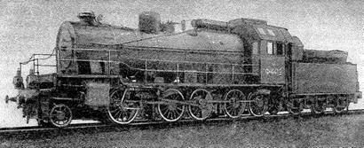 Паровоз 1-5-0 системы Фламма